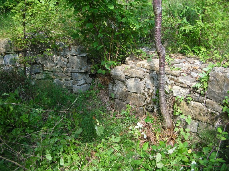 Ruderi della chiesa di S. Andrea di Caserza